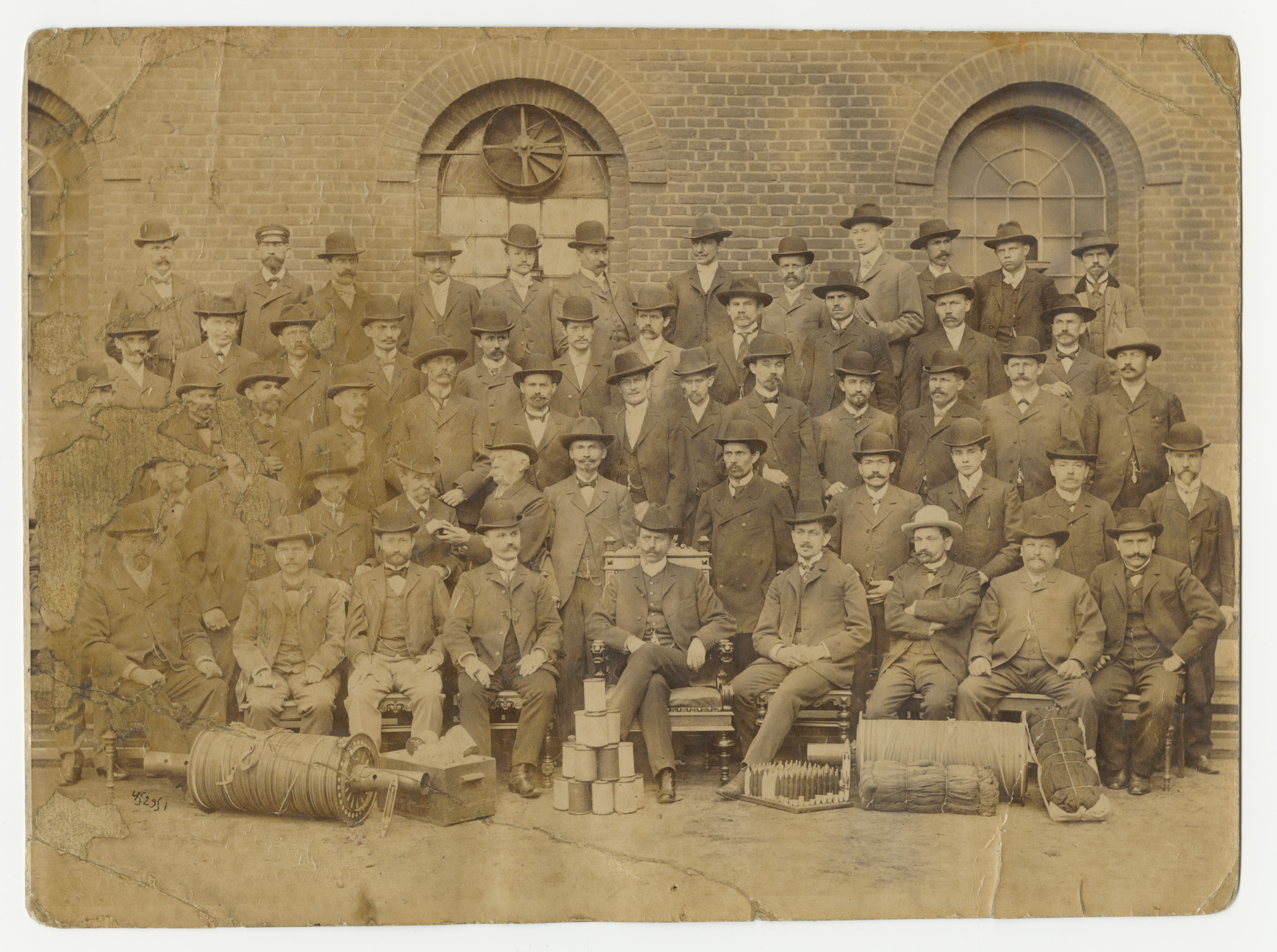 Fotografia grupowa przedstawiająca grupę majstrów zatrudnionych w Nowej Tkalni Scheiblera, znajdującej się na ul. Kilińskiego 187 w Łodzi. Mężczyźni sfotografowani zostali przed budynkiem fabrycznym. Nowa Tkalnia została wybudowana w 1898 r. według projektu Pawła Rubensahma. W fabryce zajmującej powierzchnię 3 ha pracowało 3 tysiące krosien.